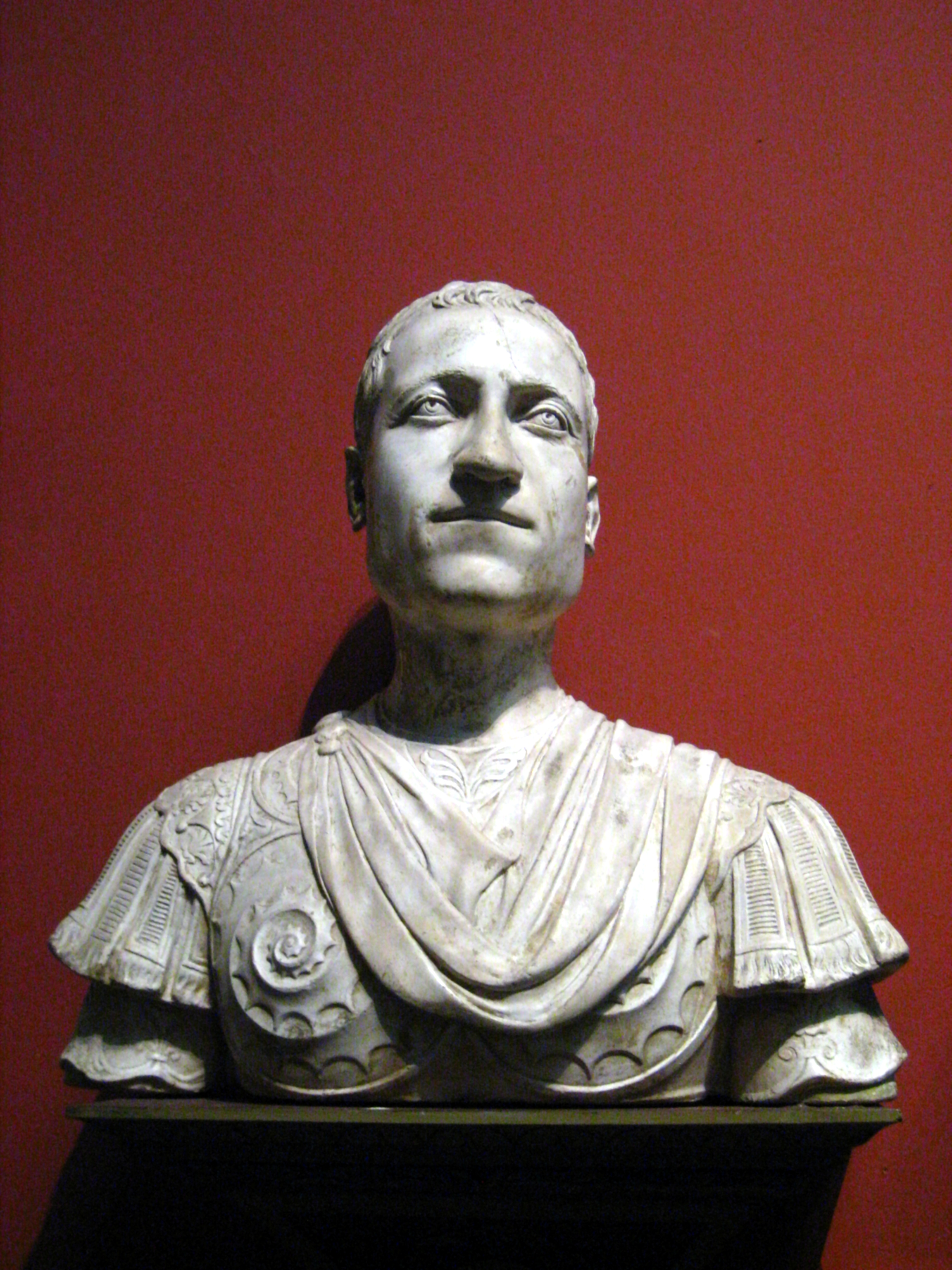 Giovanni di Cosimo de' Medici (Mino da Fiesole). Cast from original in Florence